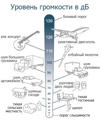 Səs ucalığının desibel şkalası.